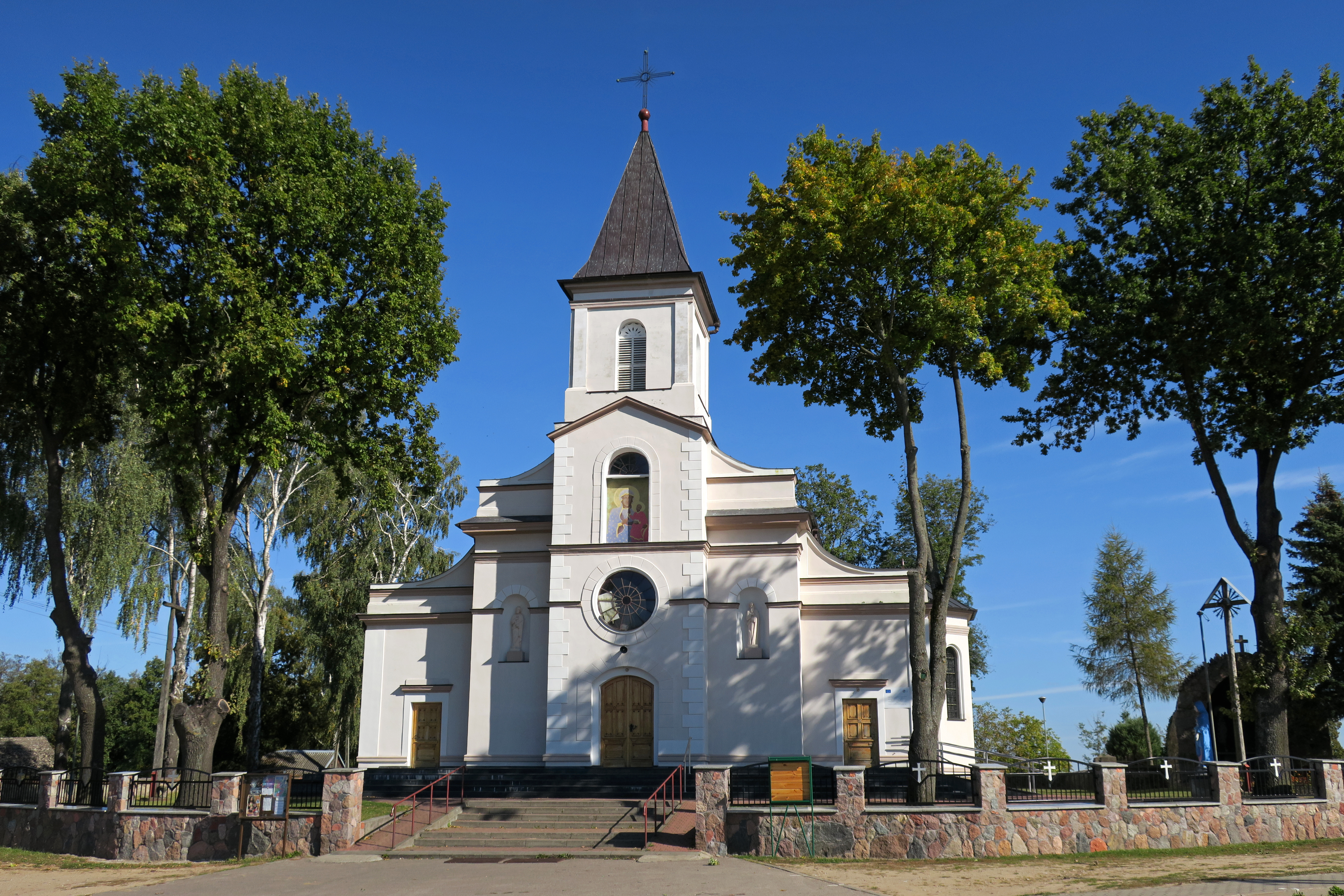 Kościół pw. św. Jana Chrzciciela w Grabowie